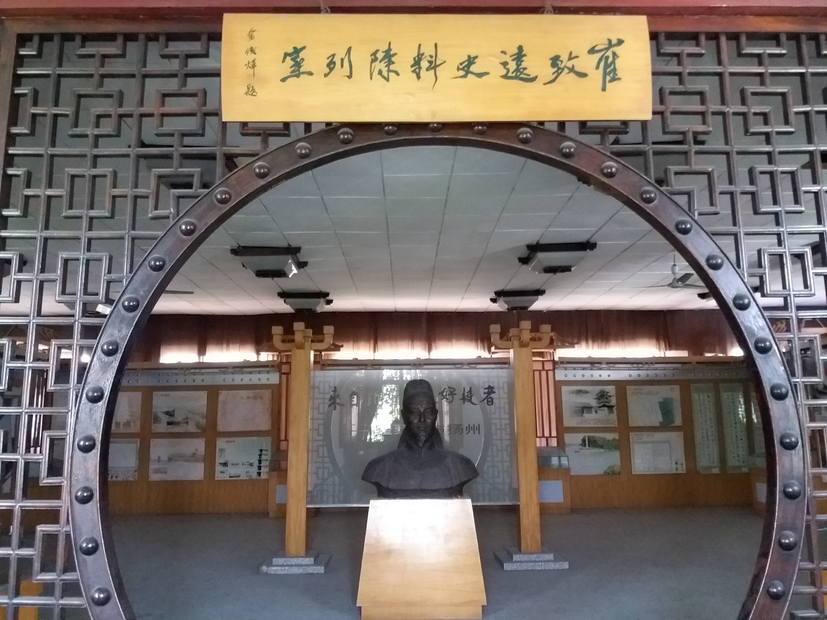 延和阁崔致远史料陈列展入口